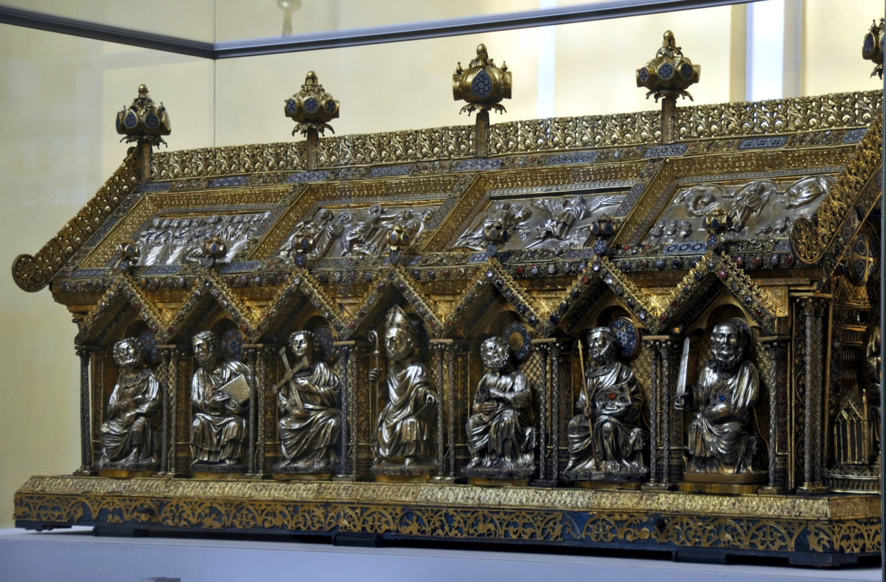 Schrijn van Remaclus in Sint-Sebastiaanskerk te Stavelot